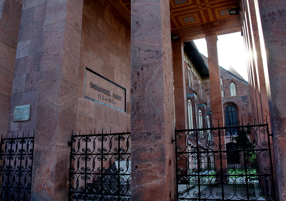 Immanuel Kant grave